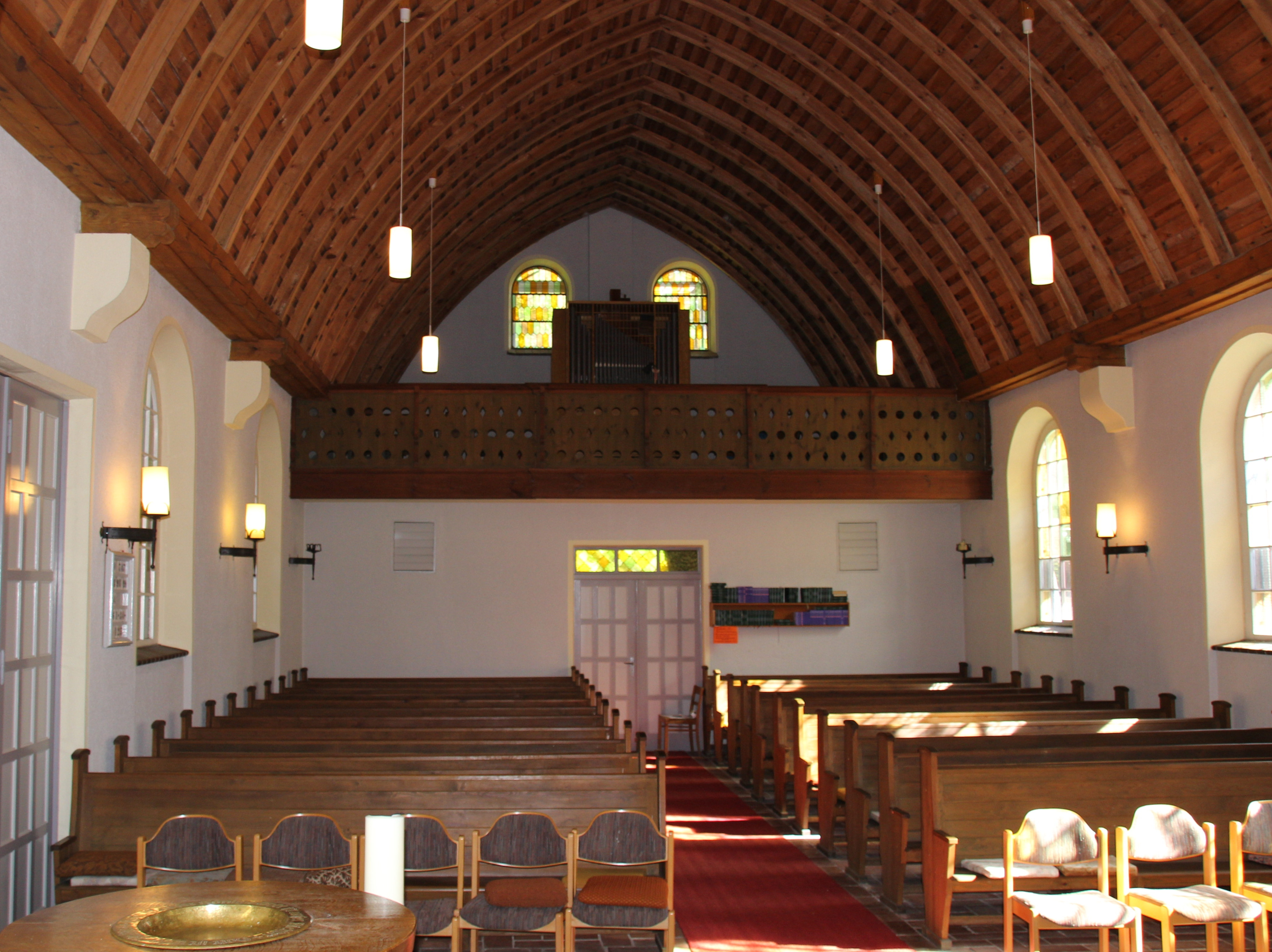 Dorfkirche Borgsdorf Hohen Neuendorf Chor und Empore